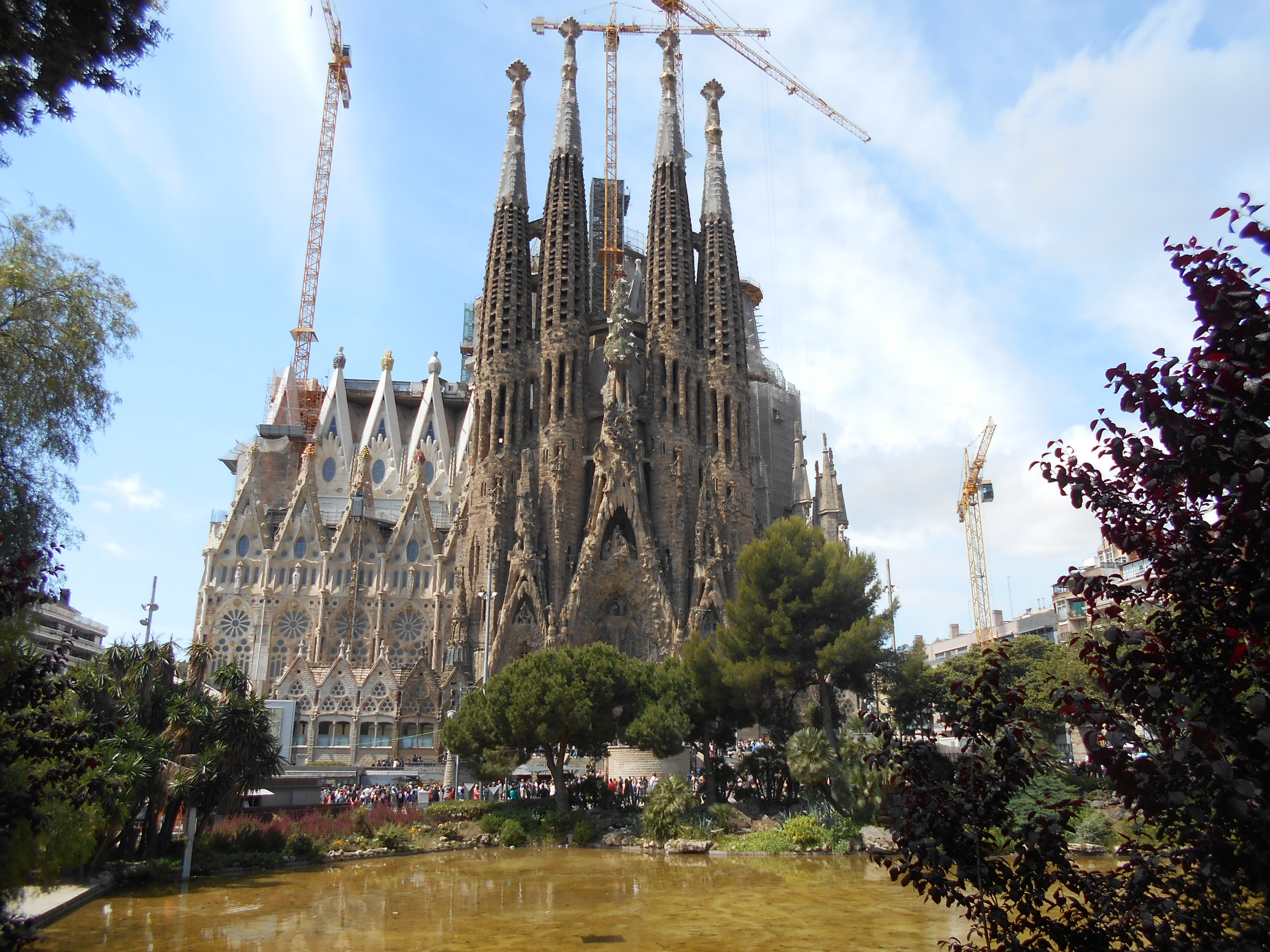 Sagrada Familia.